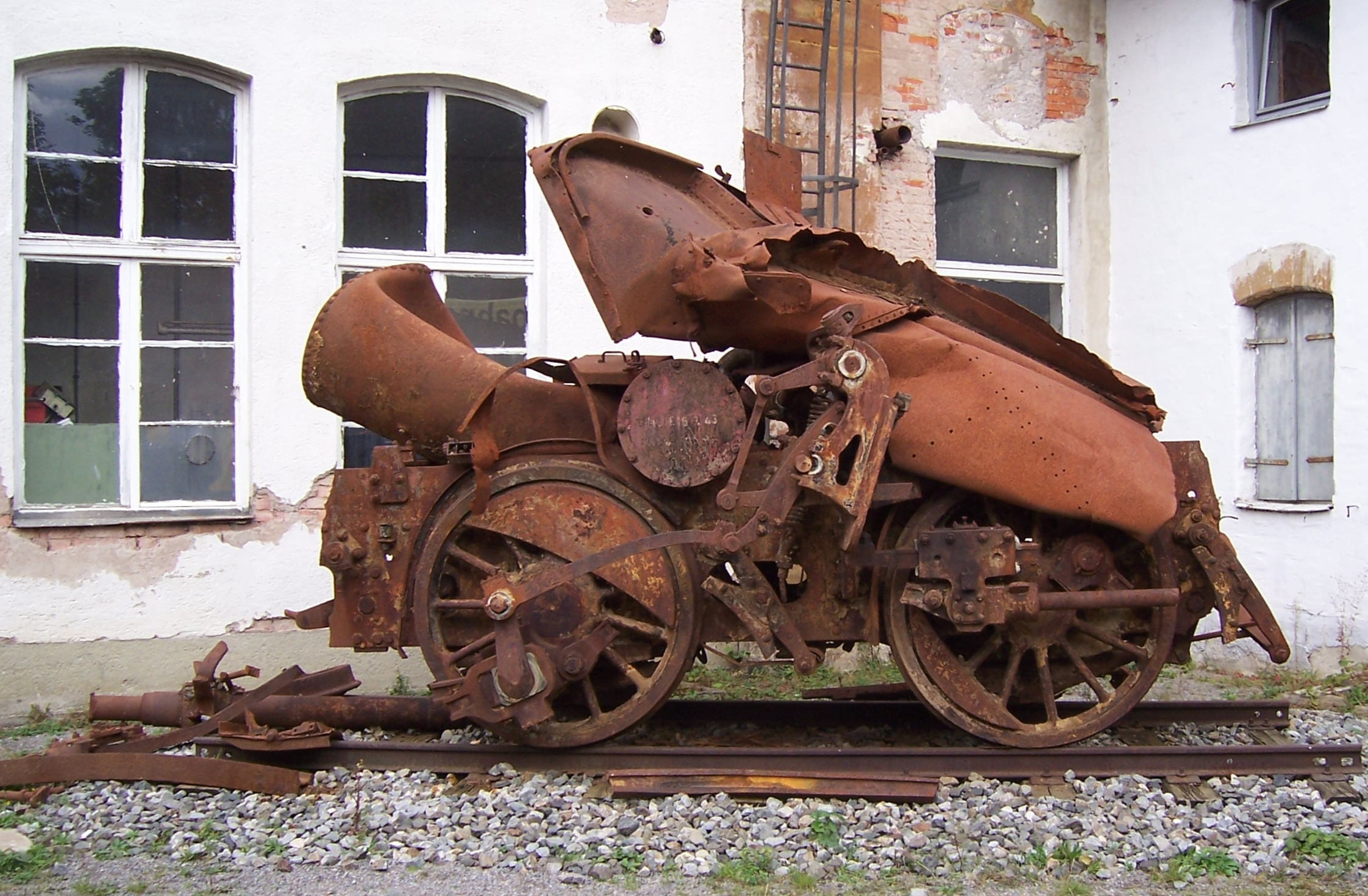 Wrack einer G 3/4 im Bayerischen Eisenbahnmuseum.